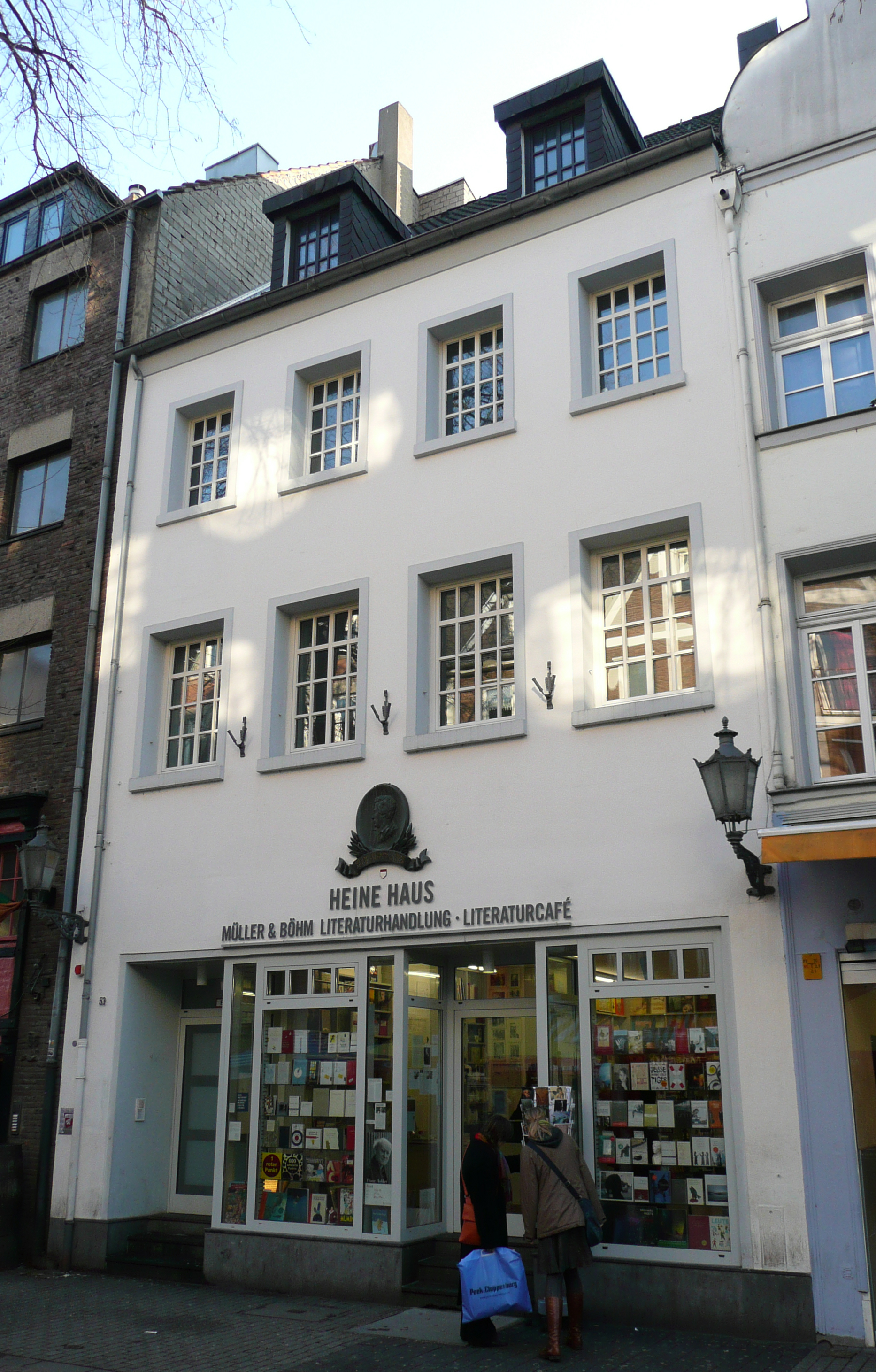 Heine Haus in der Düsseldorfer Bolkerstraße